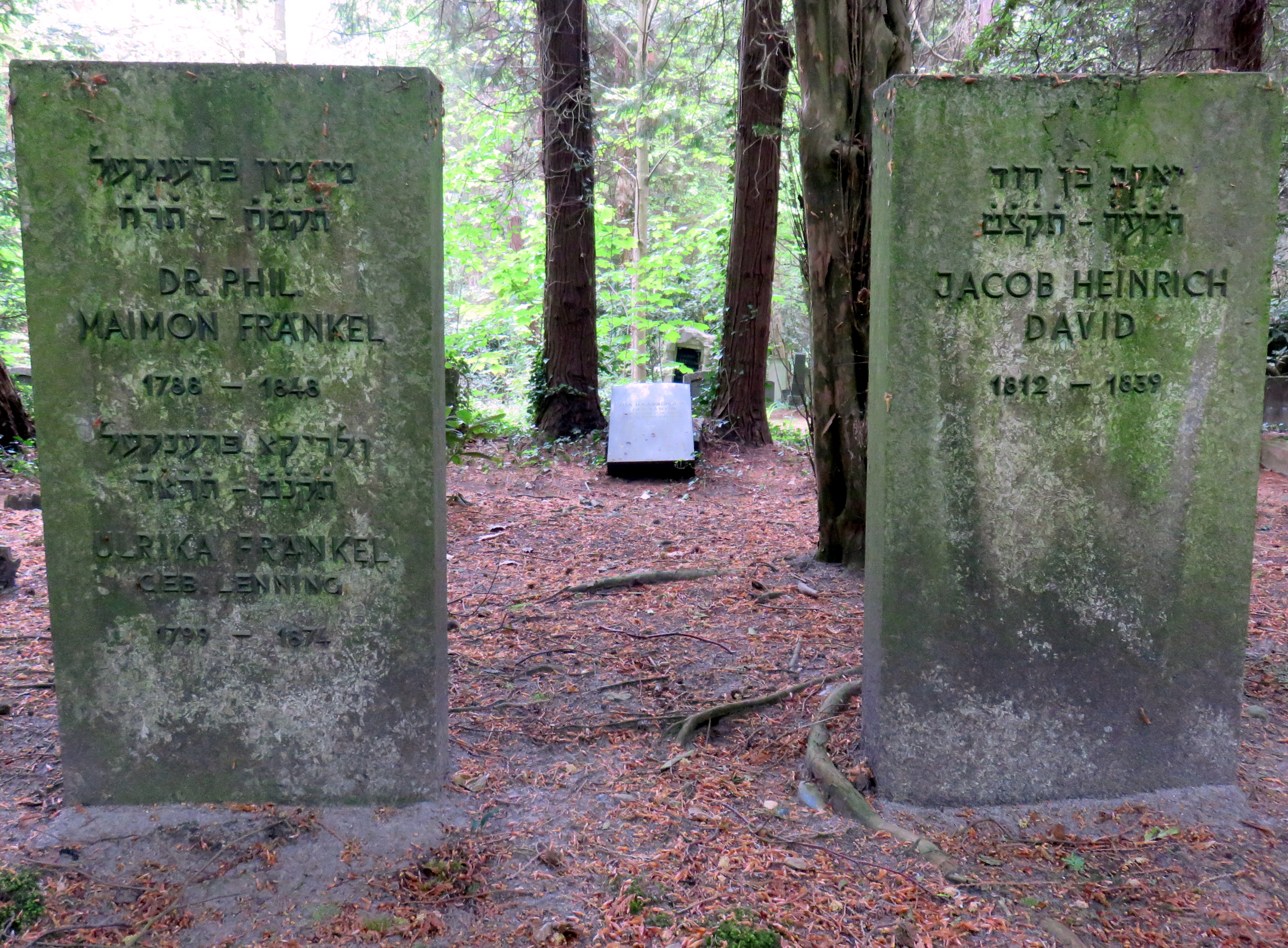 Gedenkstein (links) für den Lehrer und Publizisten Maimon Fraenkel (Pseudonym: Maimon Fredau) und seine Ehefrau Ulrika in der Ehrenanlage im Bereich „Grindelfriedhof“ auf dem Jüdischen Friedhof Ohlsdorf.